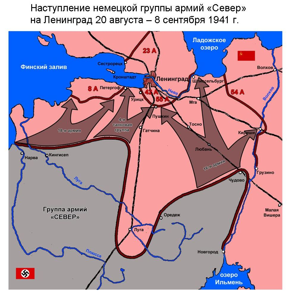 Наступление немецкой группы армий «Север» на Ленинград 20 августа – 8 сентября 1941 г.